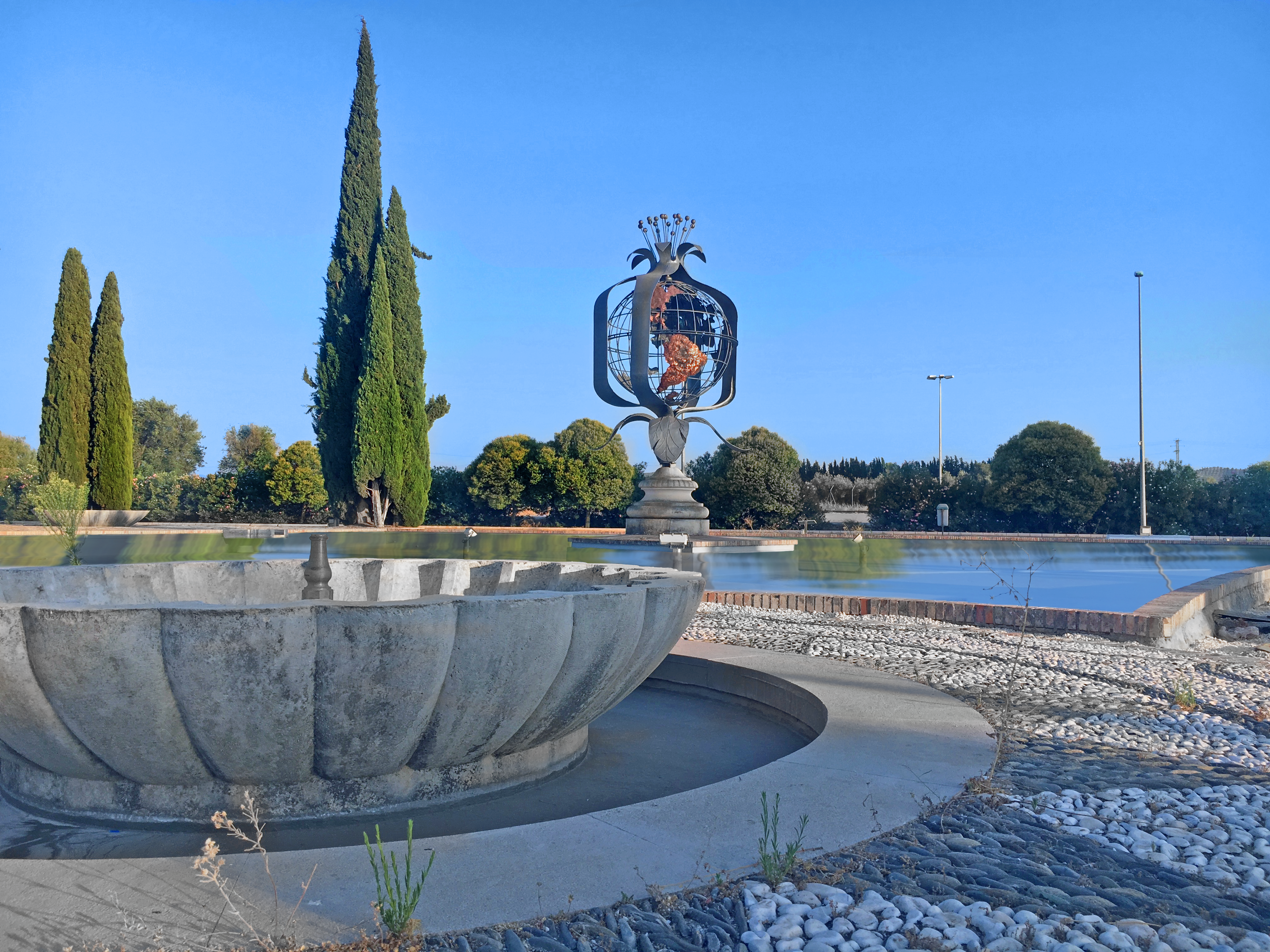 Fuente decorativa situada junto a la terminal de pasajeros del Aeropuerto Federico García Lorca, en Granada (España).